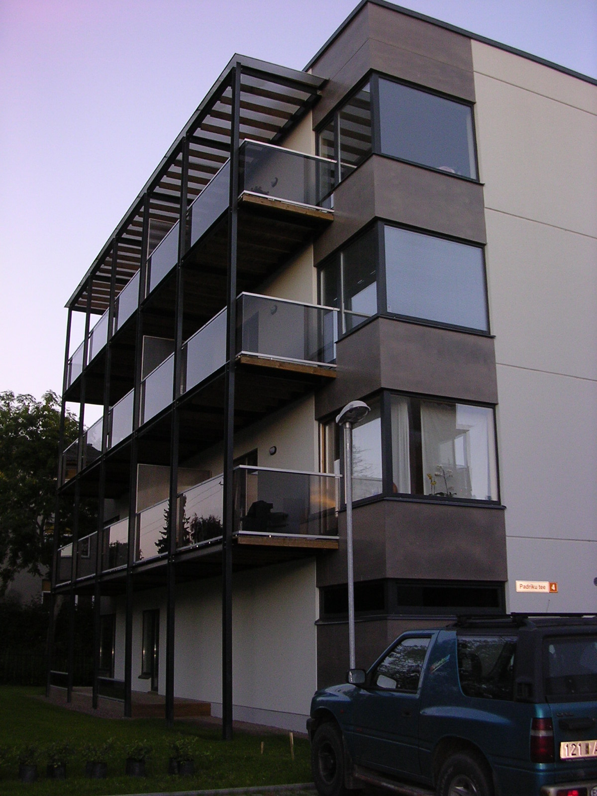 Padriku tee 4